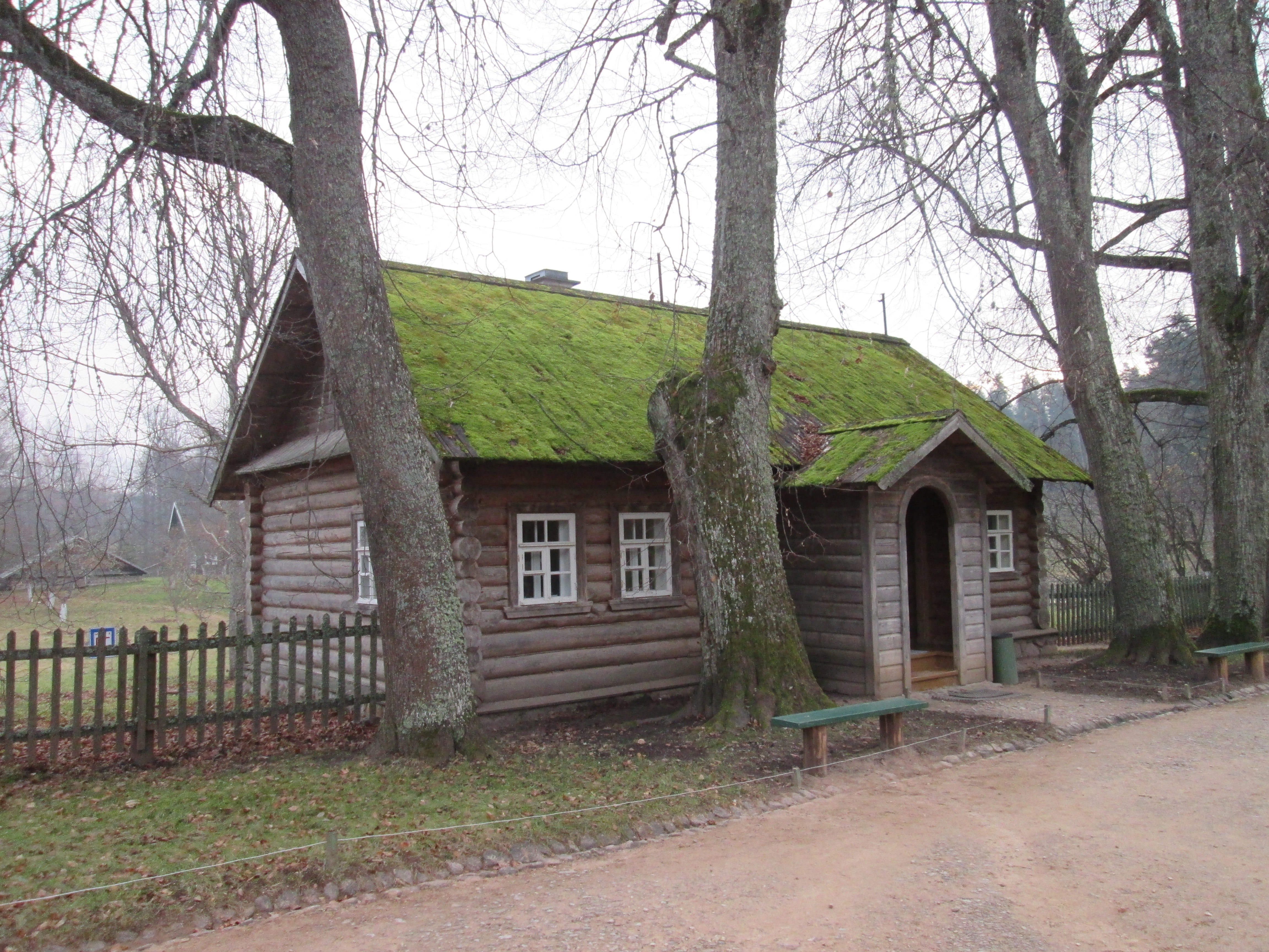 Село Михайловское (Псковская область). Мемориальный музей-заповедник А.С.Пушкина «Михайловское». Бывший дом управляющего имением "Михайловское".